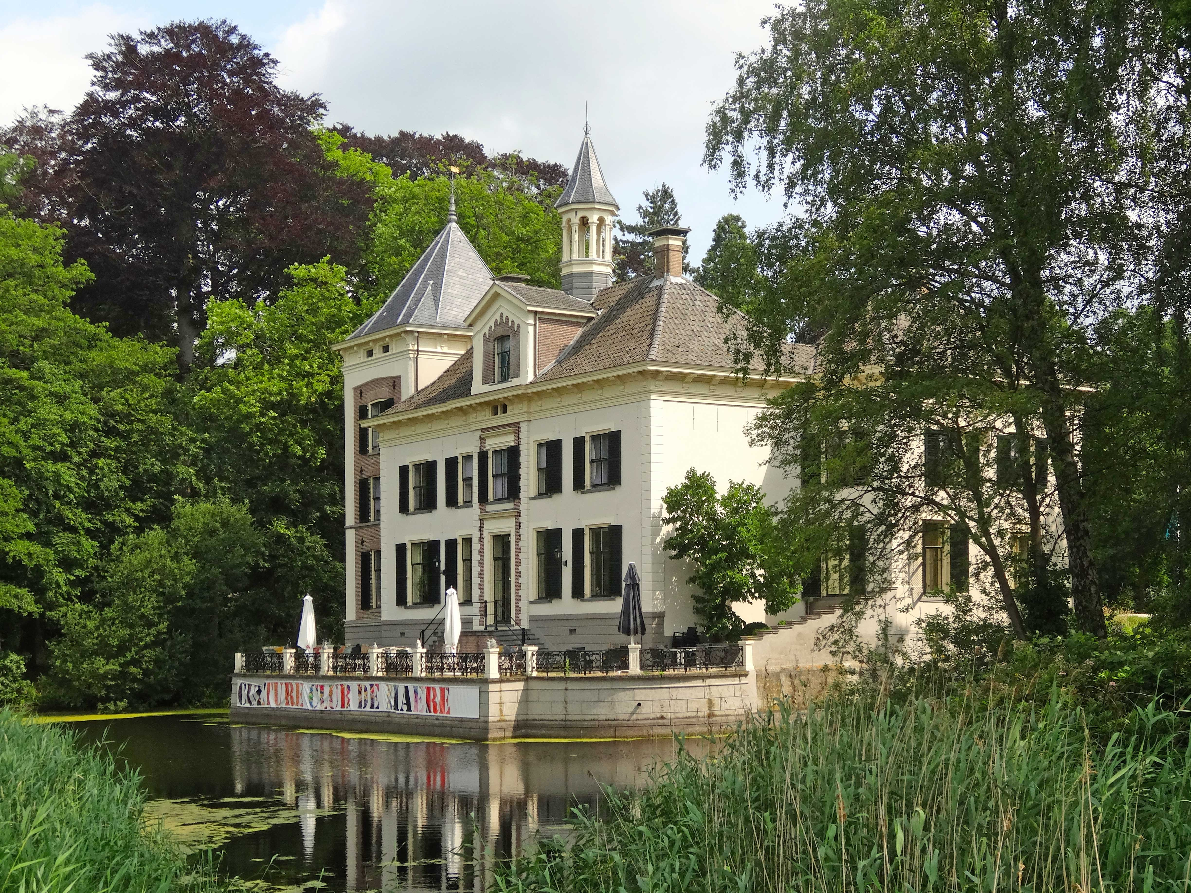 De havezate De Haere nabij Olst